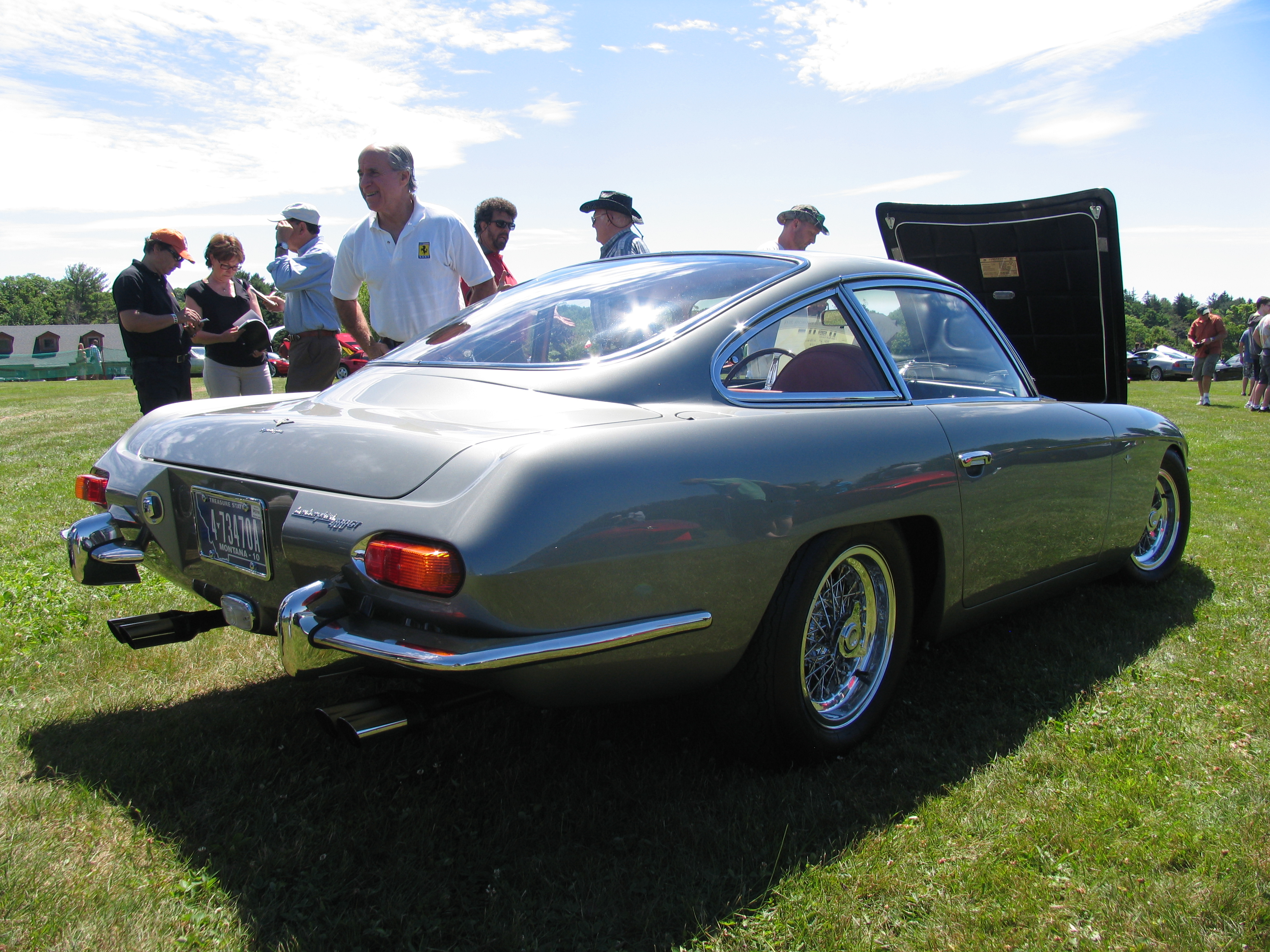 Lamborghini 400GT